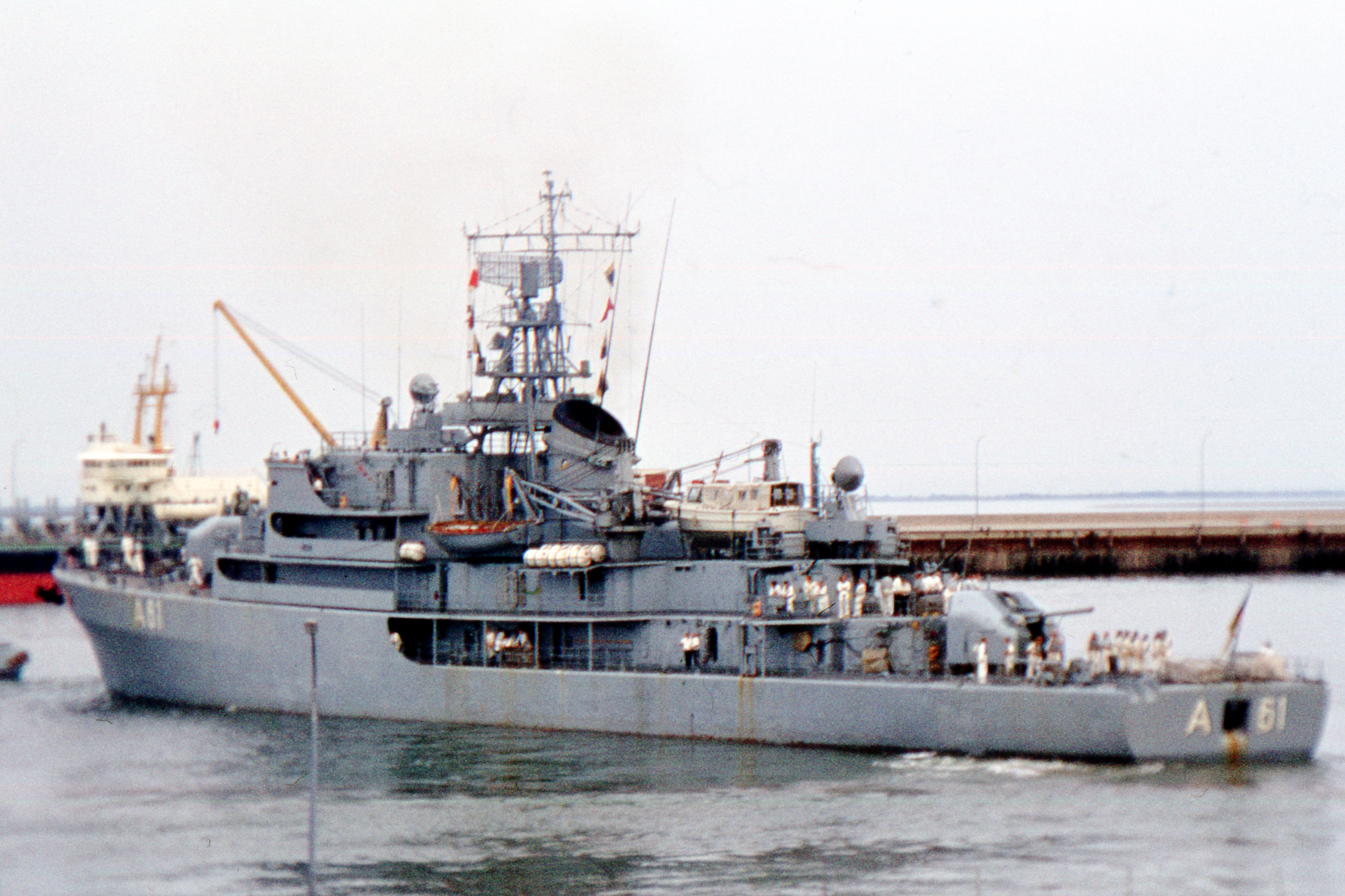 Tender Elbe in der 4. Einfahrt (Wilhelmshaven)